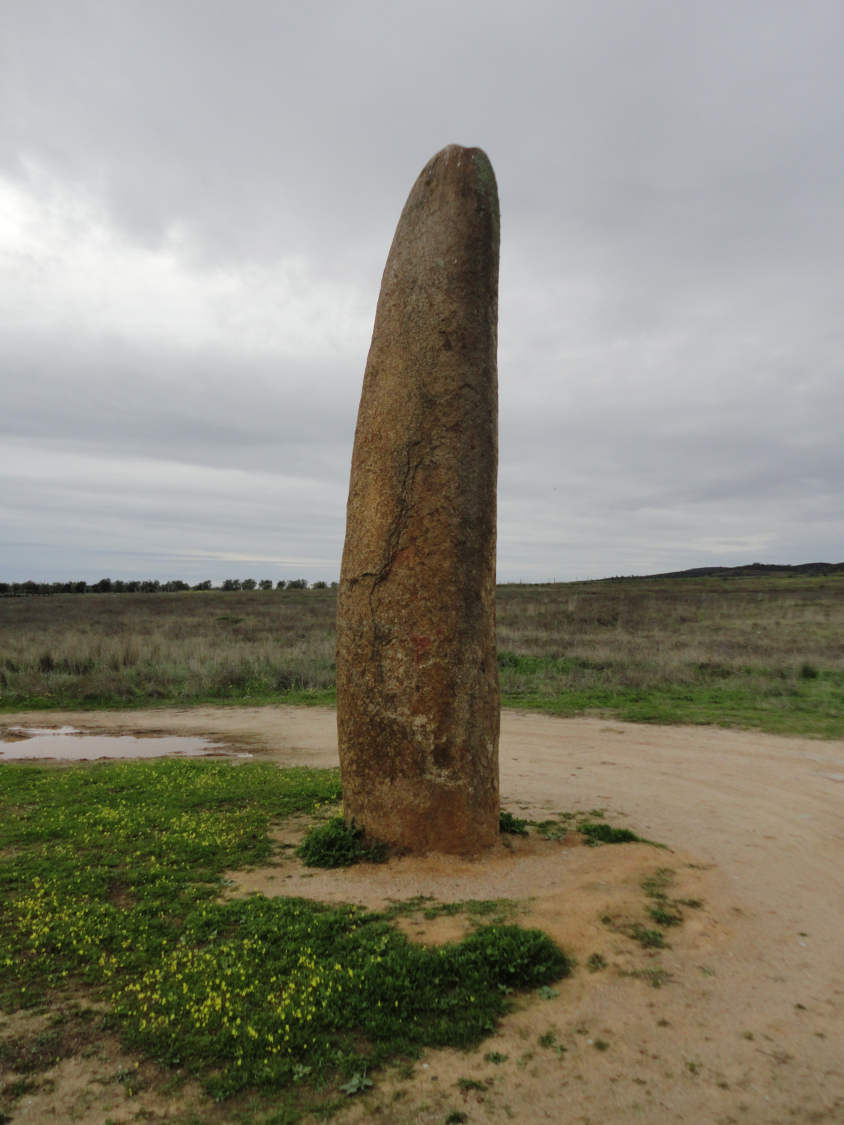 Menir do Outeiro, Reguengos de Monsaraz